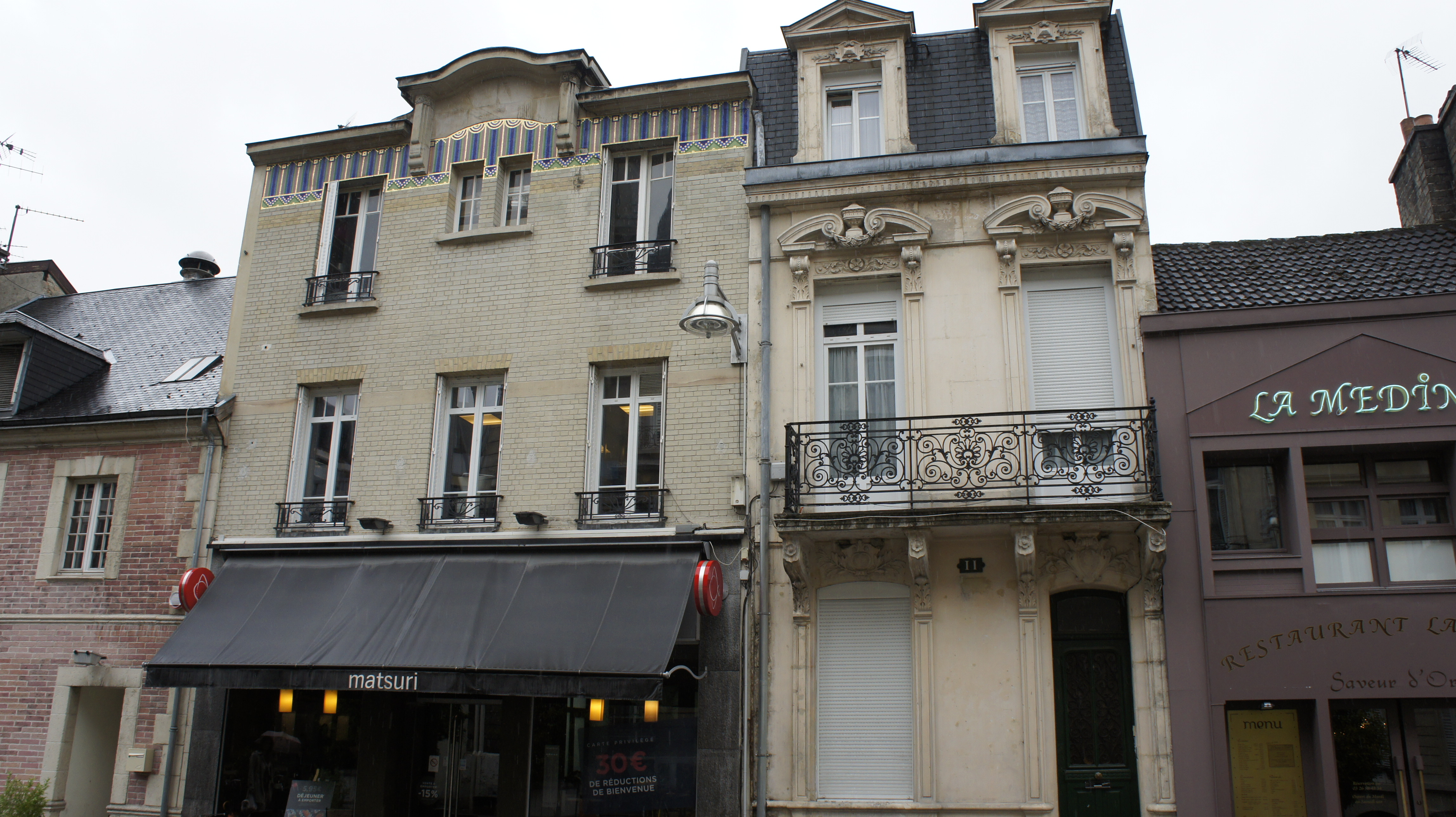 à Reims.